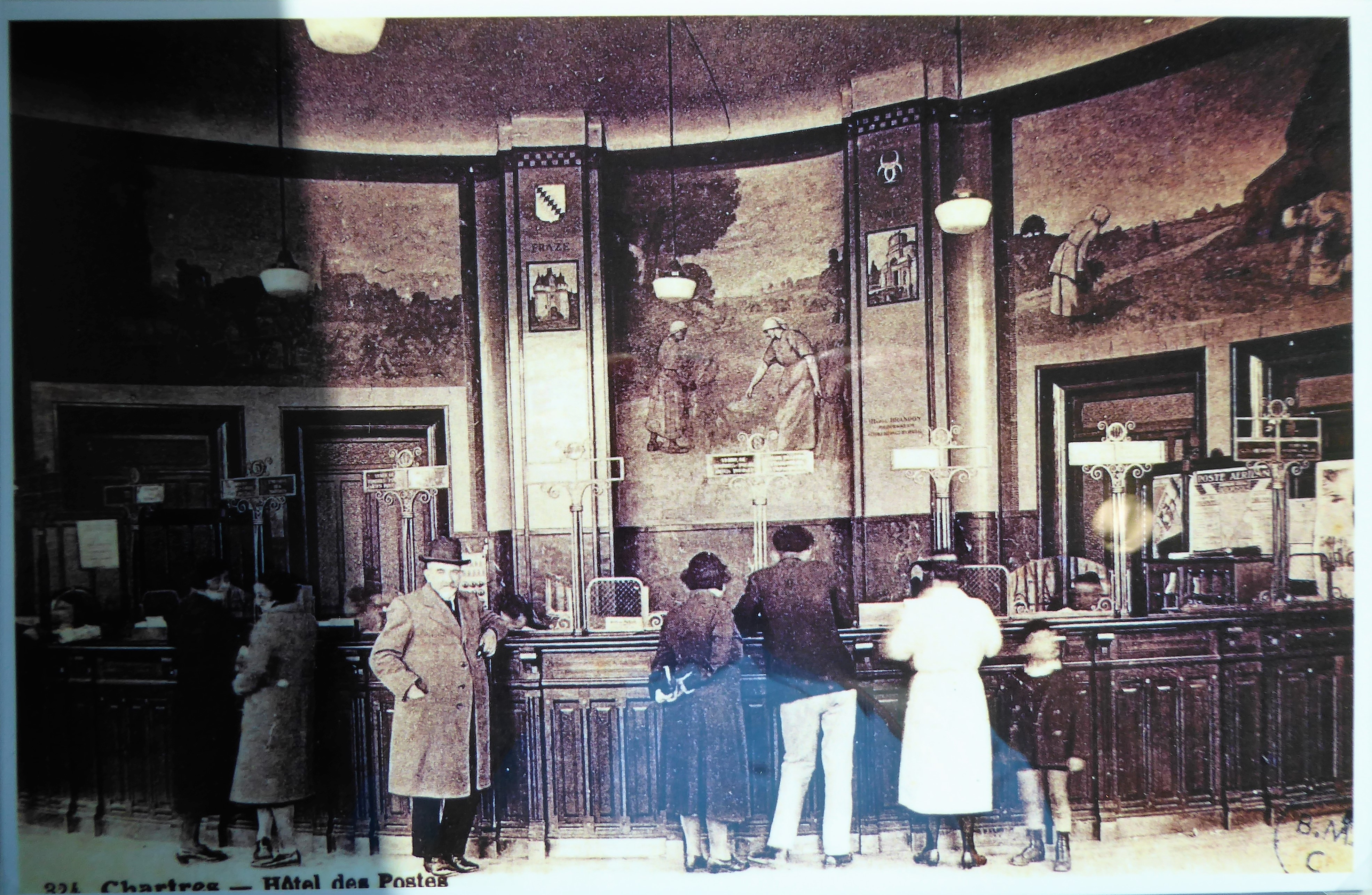 Raoul Brandon, l'architecte de l'édifice, devant les guichets de l'hôtel des Postes de Chartres, Eure-et-Loir, France. (Carte postale n°324, collection Médiathèque l'Apostrophe, exposition 2017.)